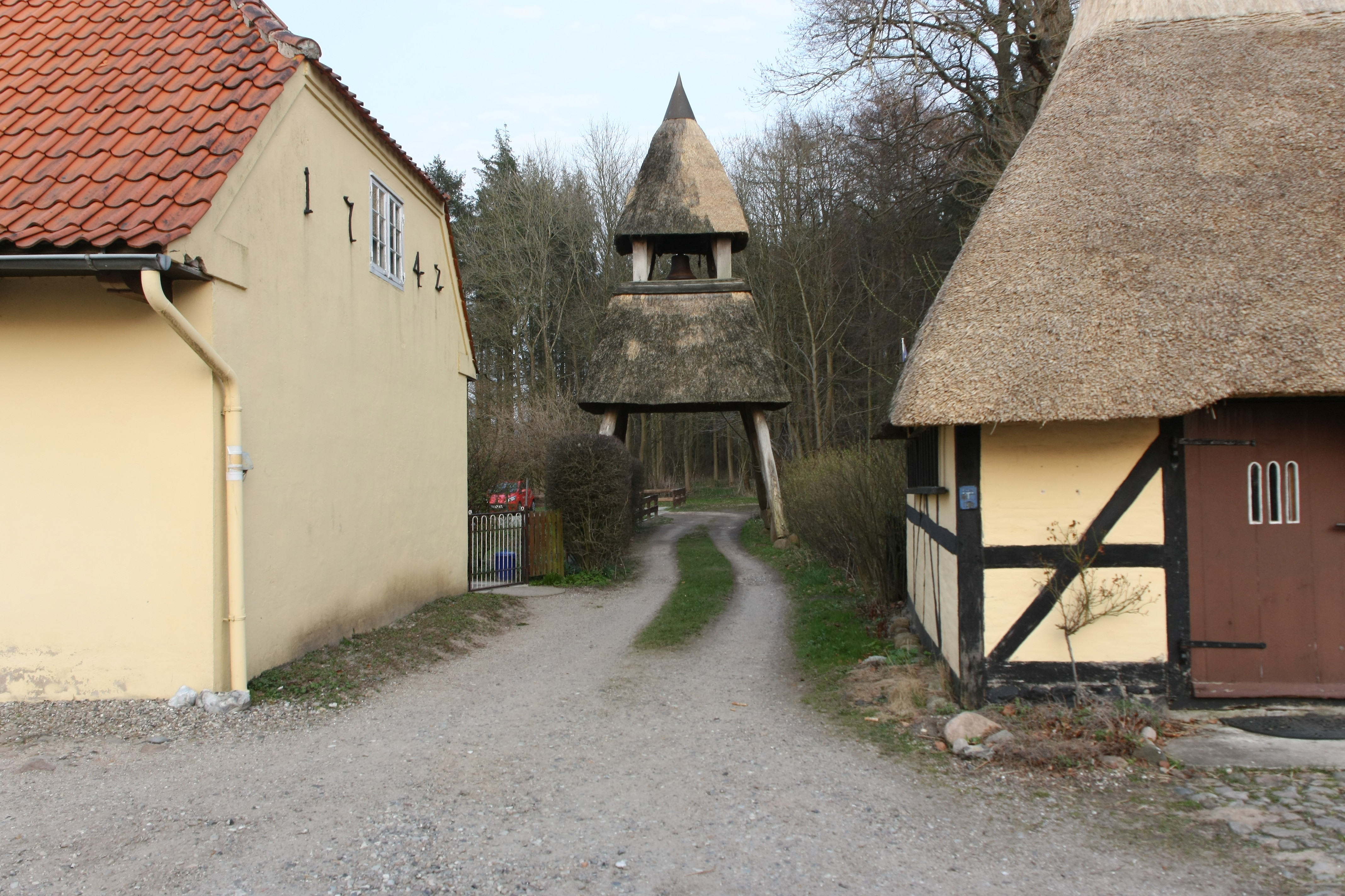 Sankt Johannes-Stift Damp This is the photograph of an architectural monument. It is part of the list of cultural monuments of Damp